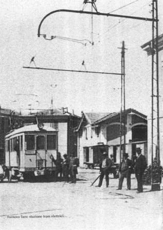 Fornovo, tram